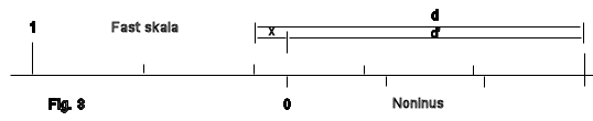 Nonius stor aflæsning.